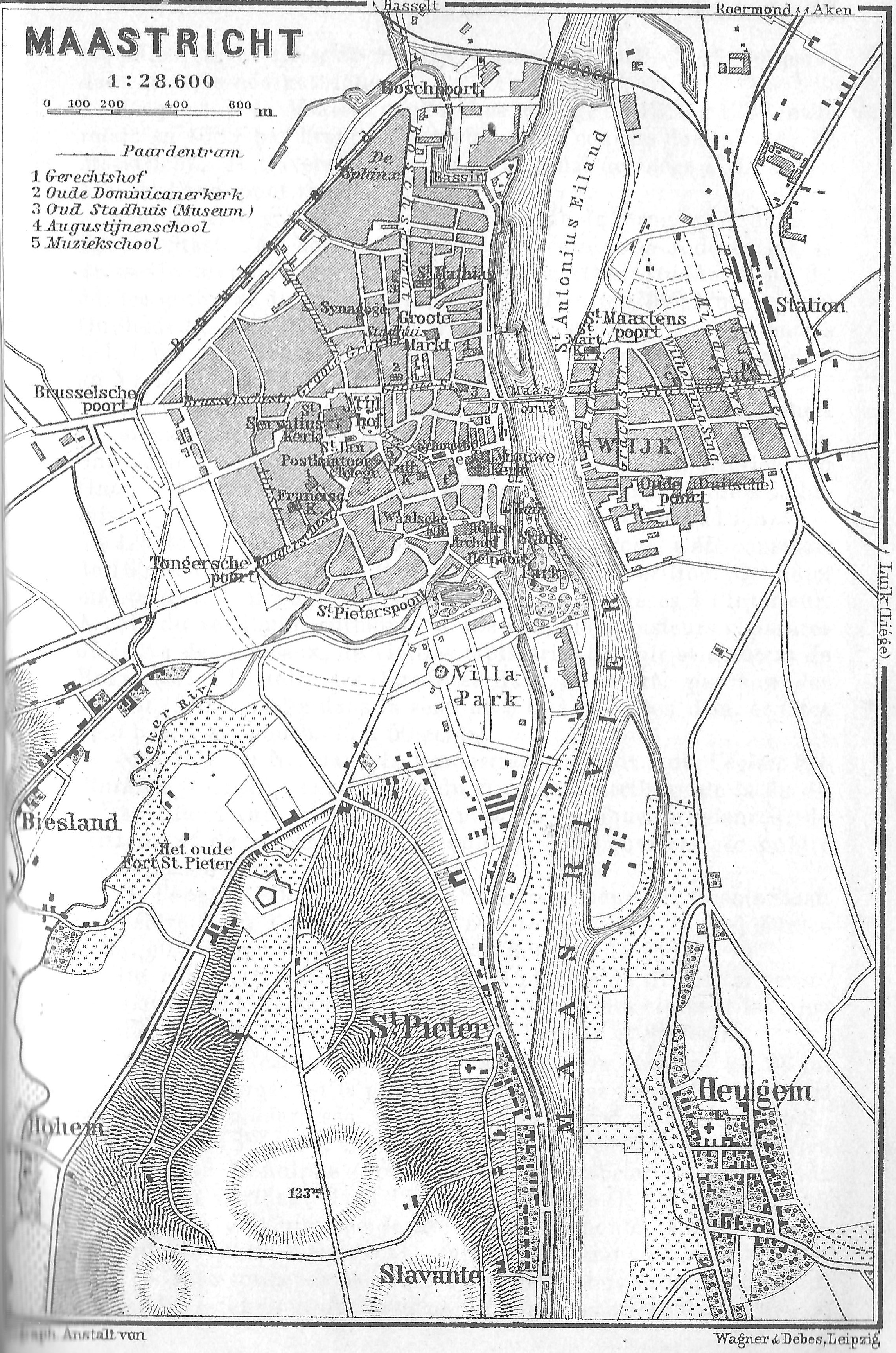 Kaart van Maastricht uit 1905. De buurtspoorlijn van Boschpoort naar Glons is te zien te zien evenals de stadstramlijn van het station naar de Grote markt en de Boulevard. Het stationsgebouw is niet aan de stadszijde.